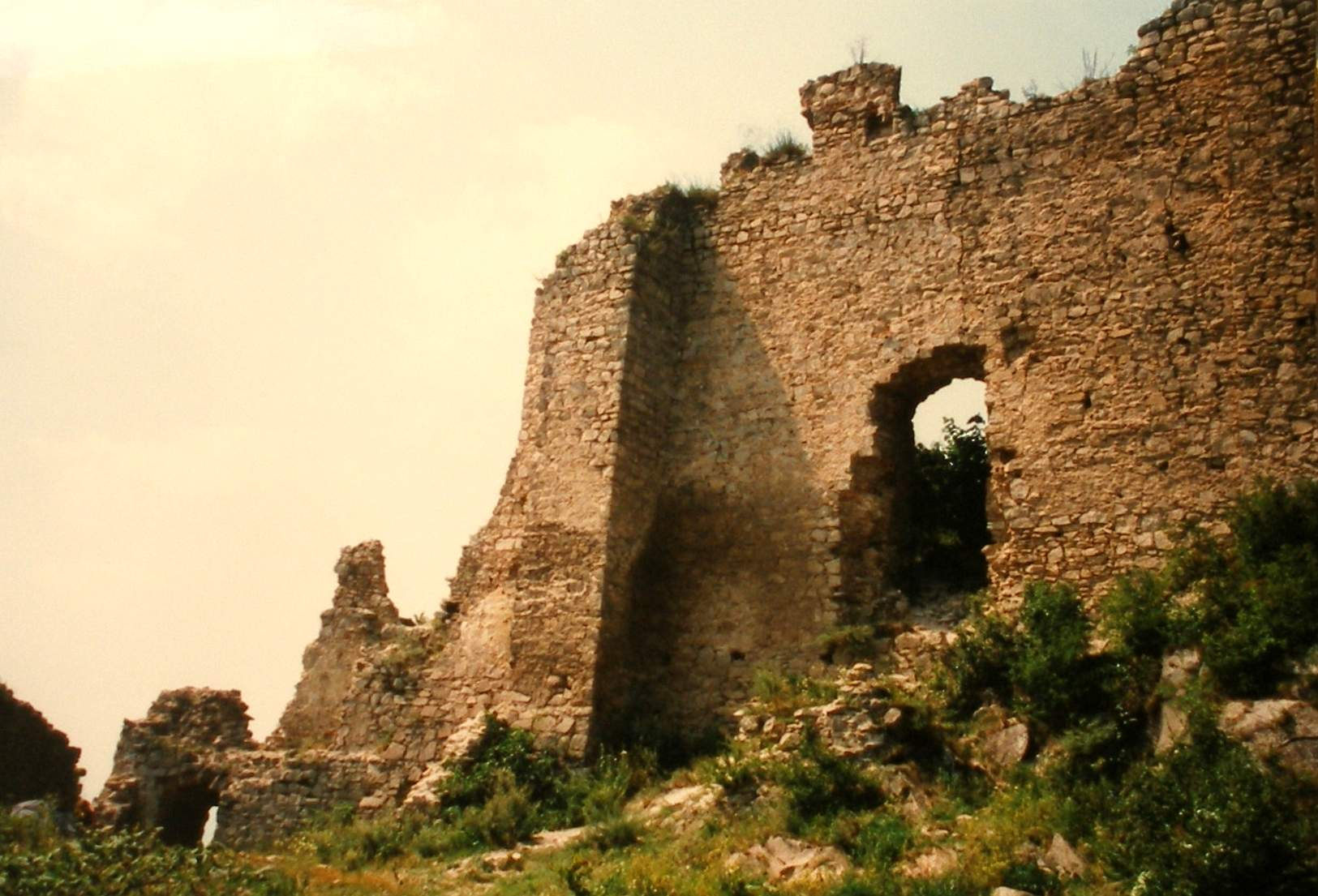 Kapušiansky hrad, zrúcanina, región Šariš, okres Prešov